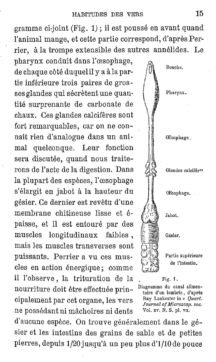 Charles Darwin, Rôle des vers de terre dans la formation de la terre végétale, traduction M. Lévêque, 1882, page 15.